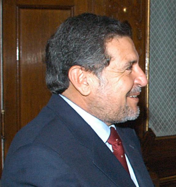 Luis Beder Herrera